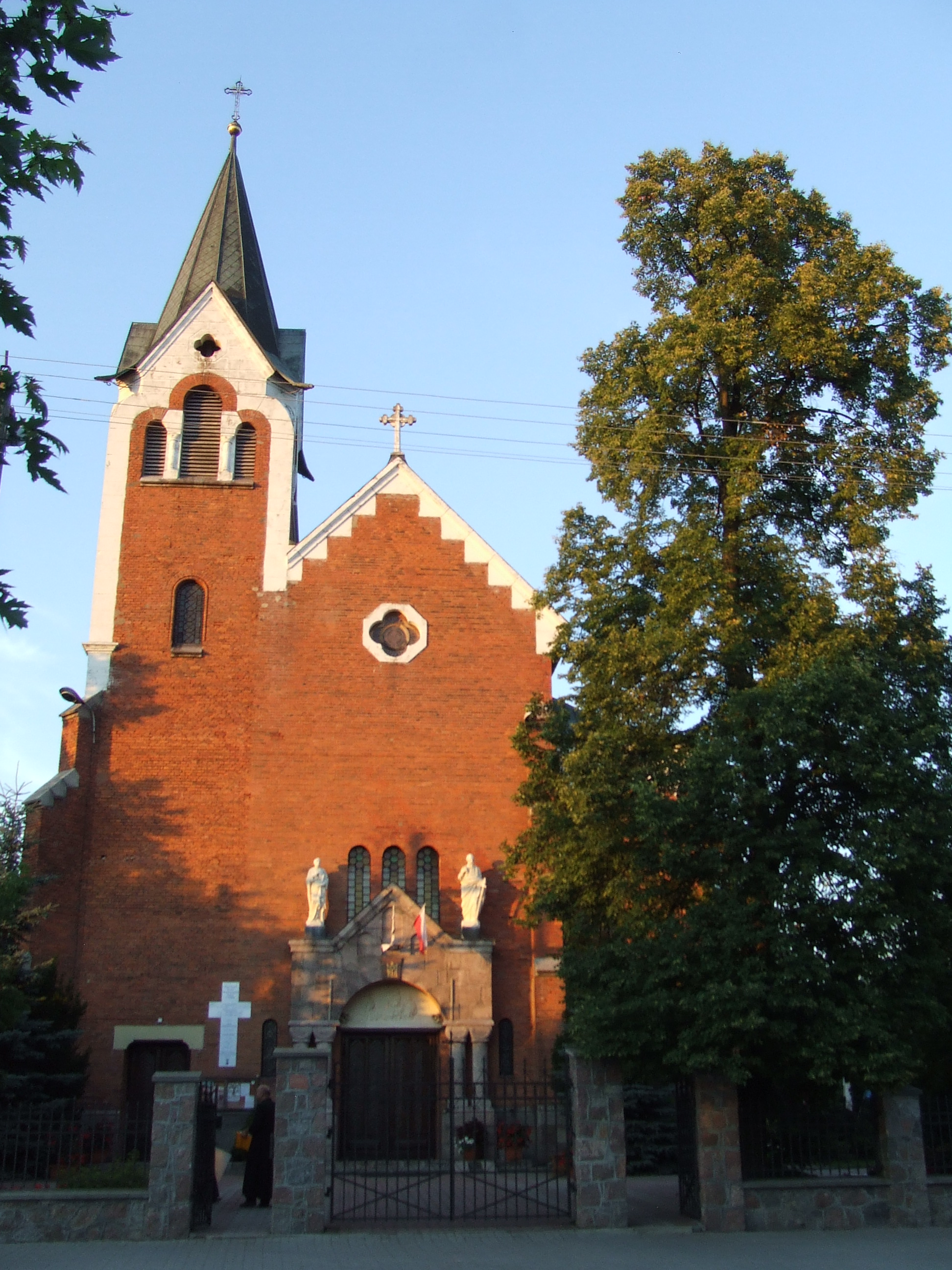 Neogotycki, murowany, rzymskokatolicki kościół parafialny pod wezwaniem Najświętszej Marii Panny w Wildze, zbudowany w latach 1913-1918. Widok od strony ulicy Warszawskiej 12.1983.